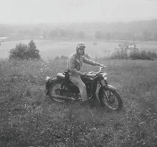 Żołnierz WOP na motocyklu WSK-175 z PM-63 RAK, w głębi motokross w Cieszynie-Boguszowicach – Strażnica Wojsk Ochrony Pogranicza Pogwizdów